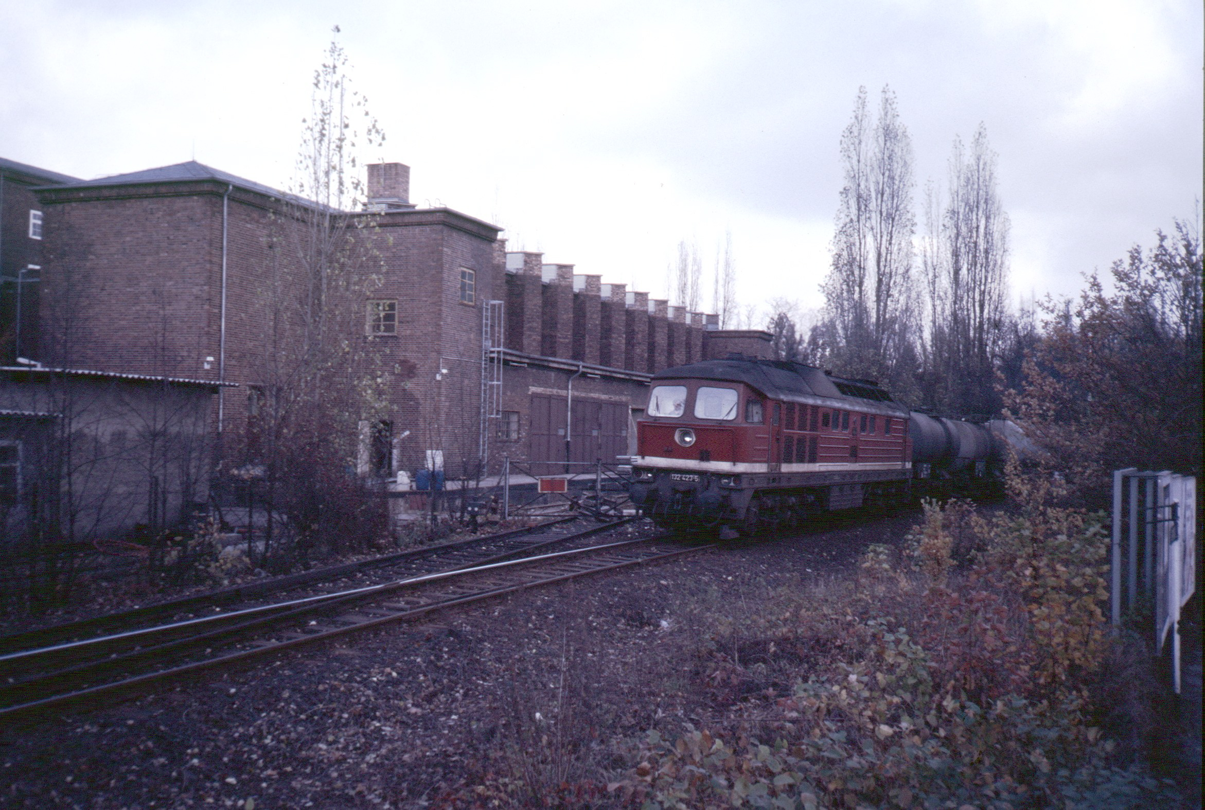 Gleichrichterwerk Halensee Berlin